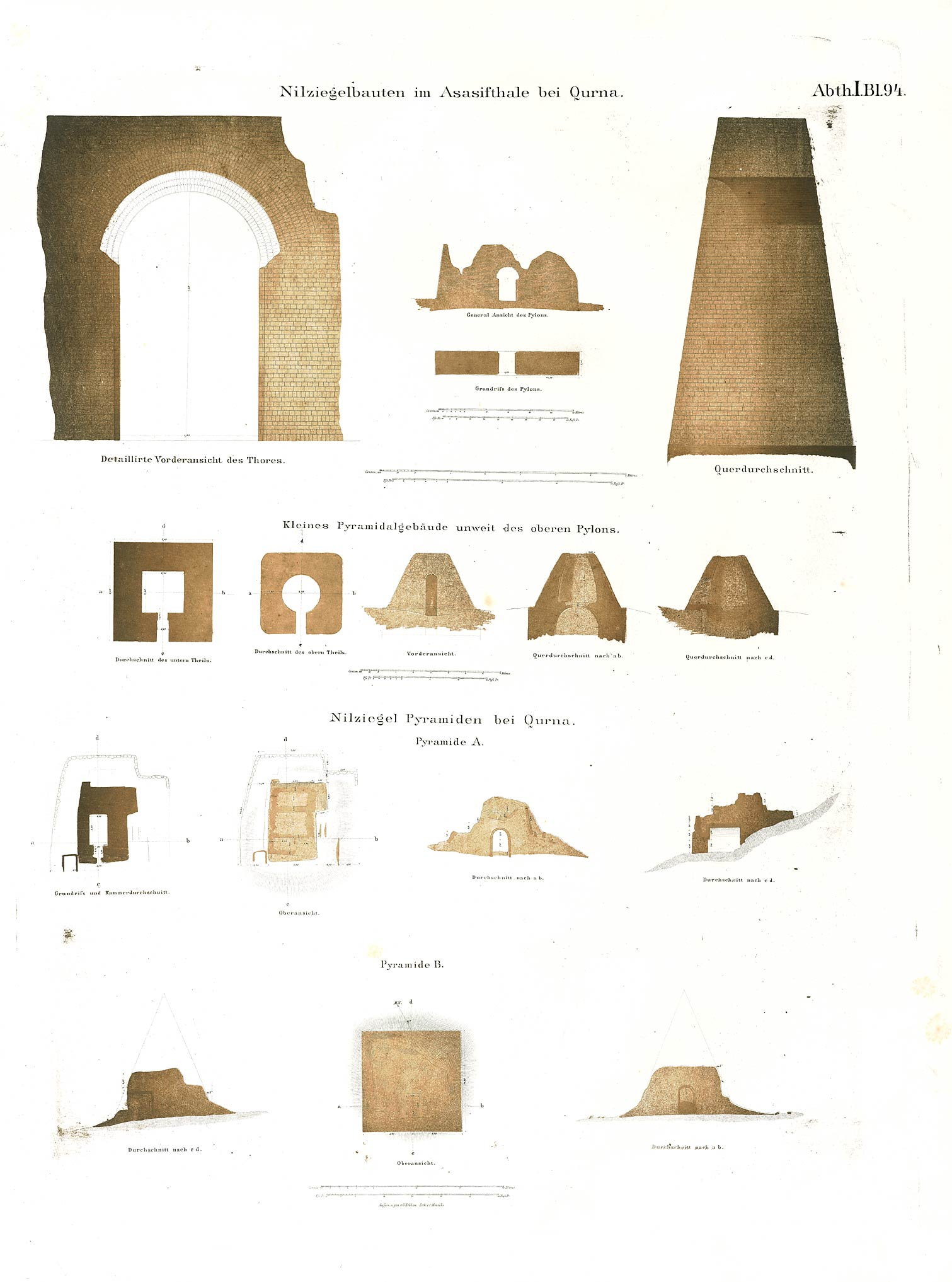 Denkmaeler aus Aegypten und Aethiopien nach den Zeichnungen der von Seiner Majestät dem Koenige von Preussen, Friedrich Wilhelm IV., nach diesen Ländern gesendeten, und in den Jahren 1842–1845 ausgeführten wissenschaftlichen Expedition auf Befehl Seiner Majestät